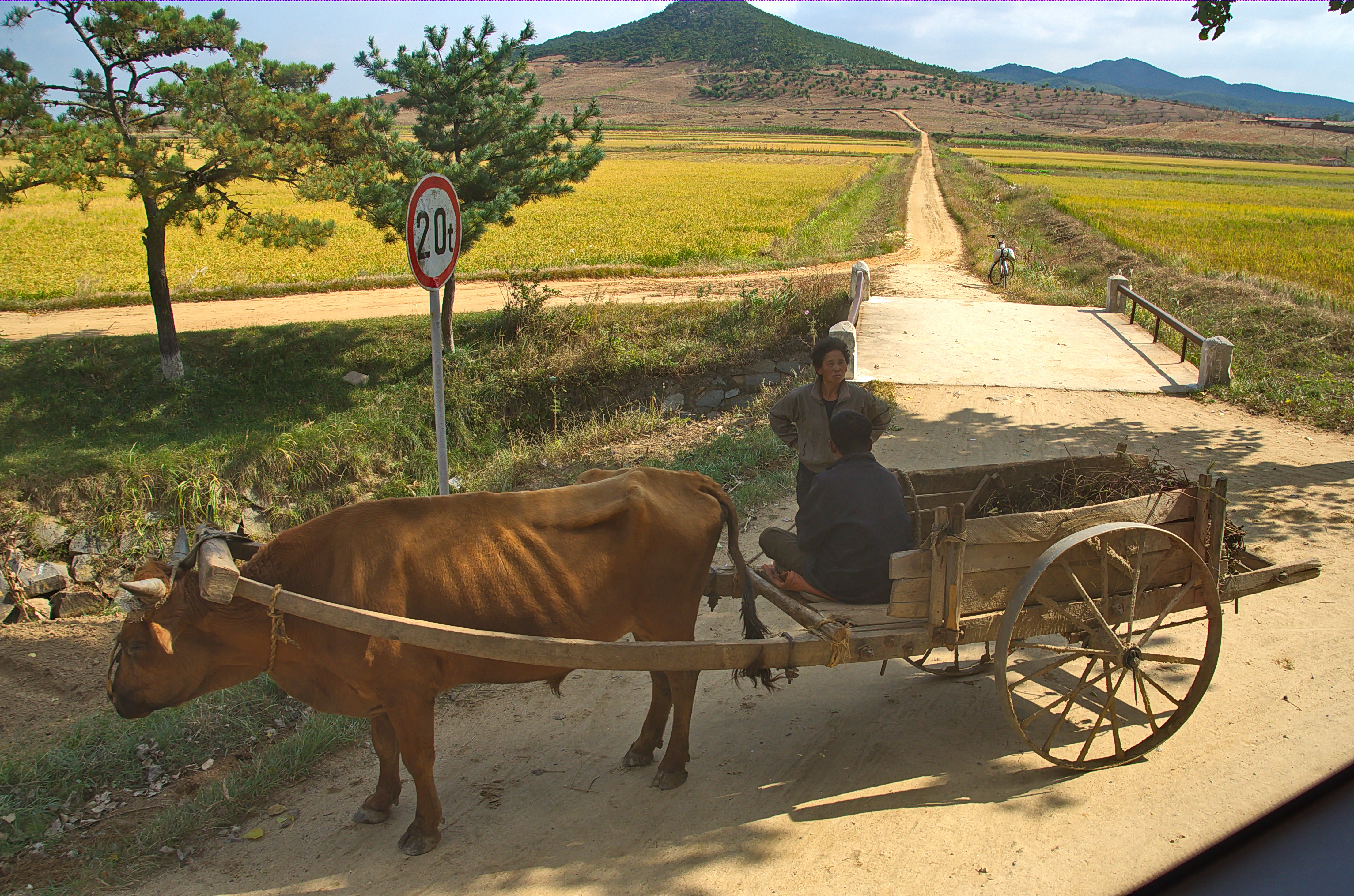 Nordkorea 2015 - von Nampo nach Käsong